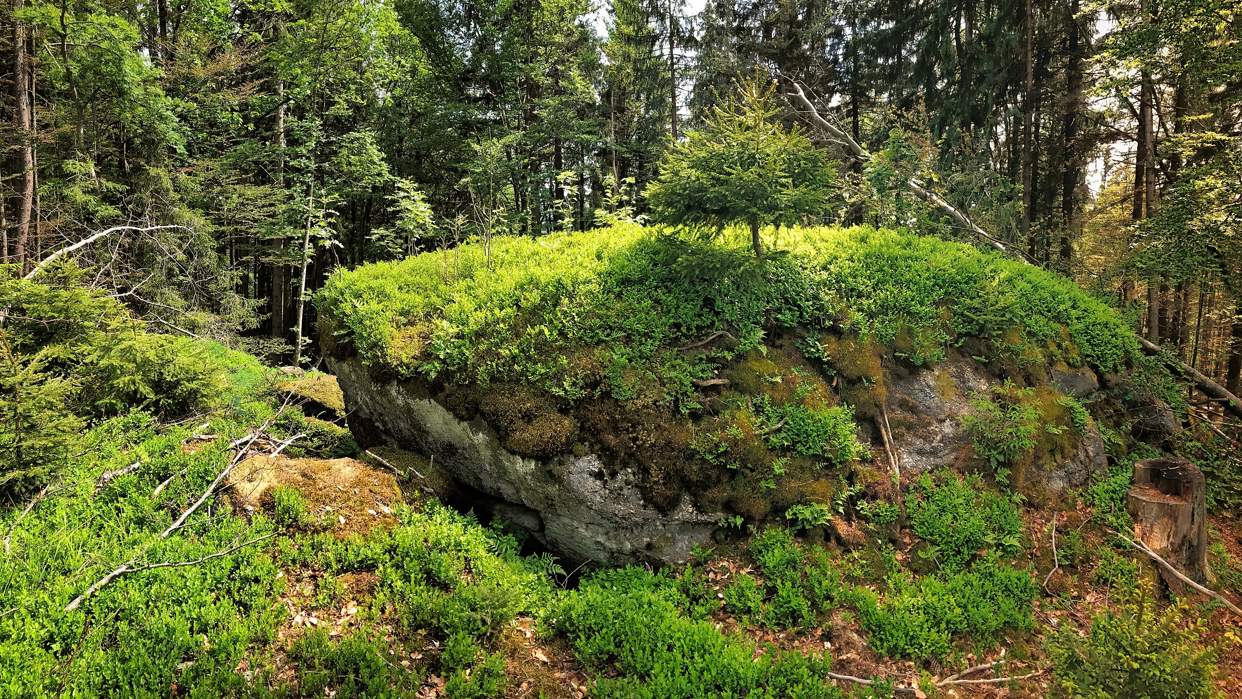 Vrcholová skalka na Poleckém vrchu (1120 m) na Šumavě